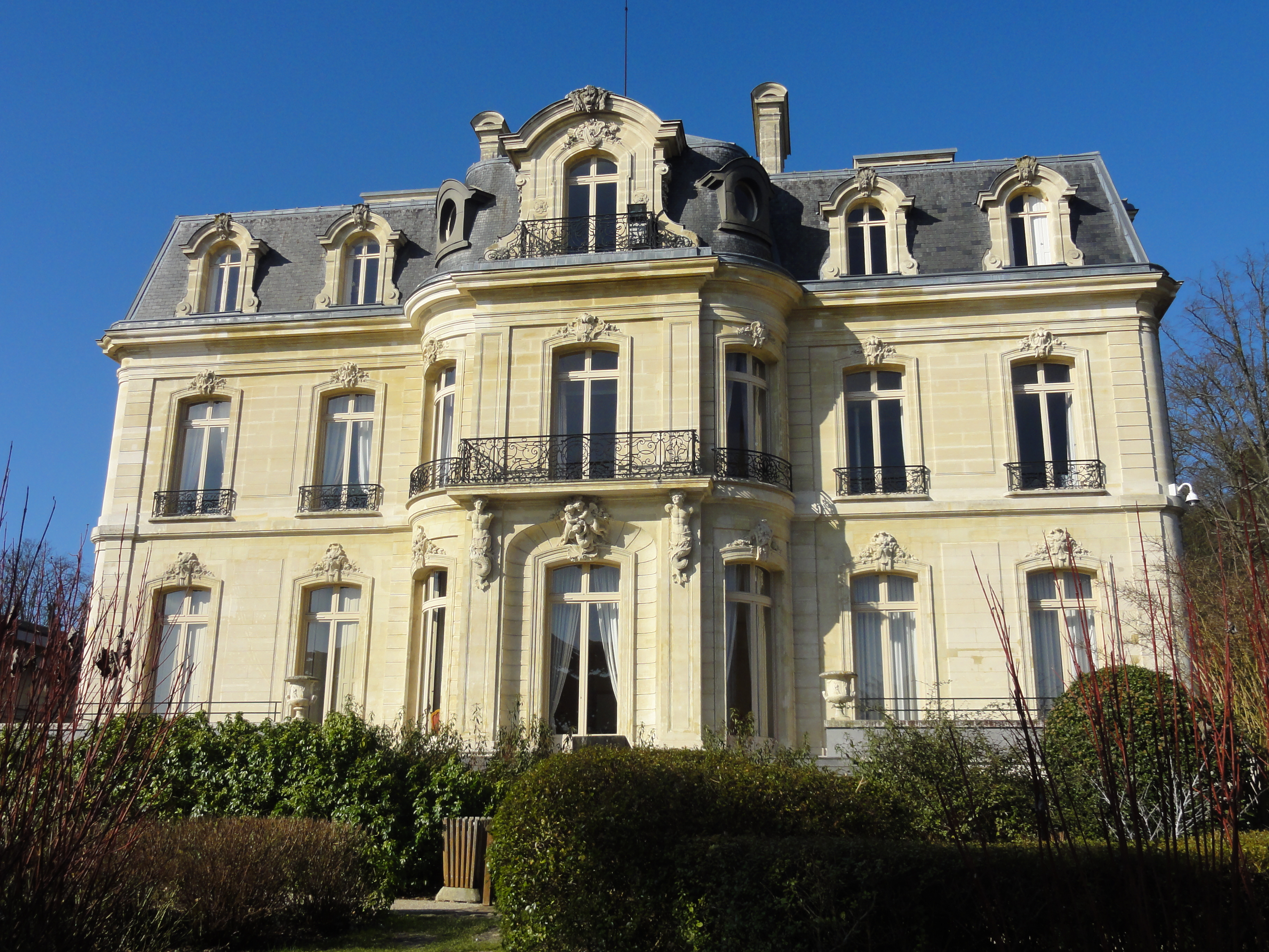 Le château de la Tuyolle (aujourd'hui hôpital).